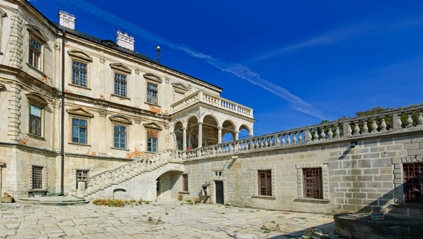 Палац в Підгірцях